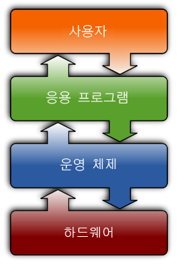 File:Operating_system_placement.svg에서 가져온 것임. 동일 조건 변경 허락 라이선스로 한국어로 수정하여 올립니다.